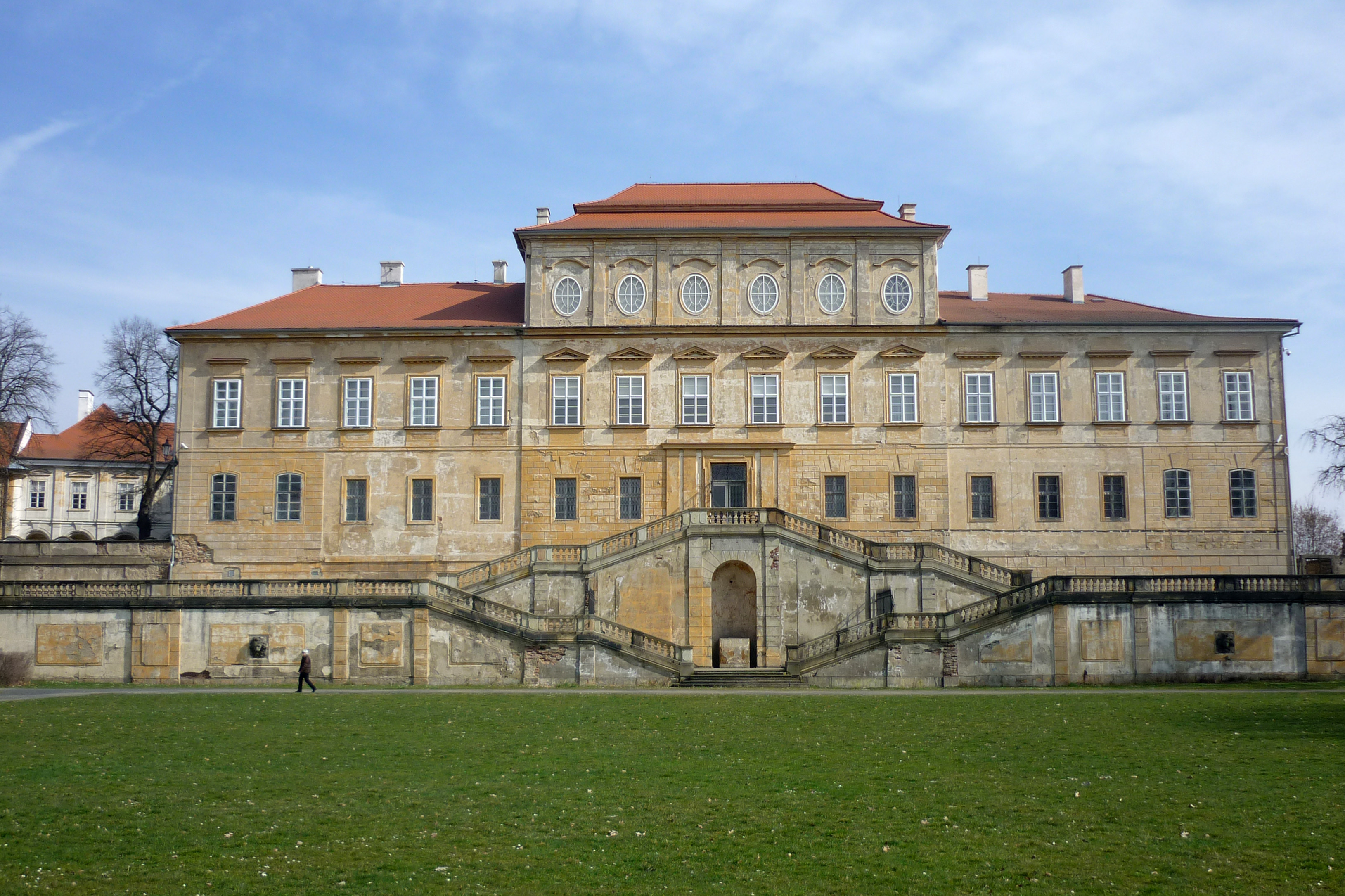 Schloss Dux (Duchcov)